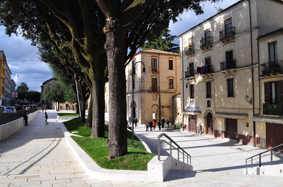 Piazza Campanella a Cosenza vista verso nord